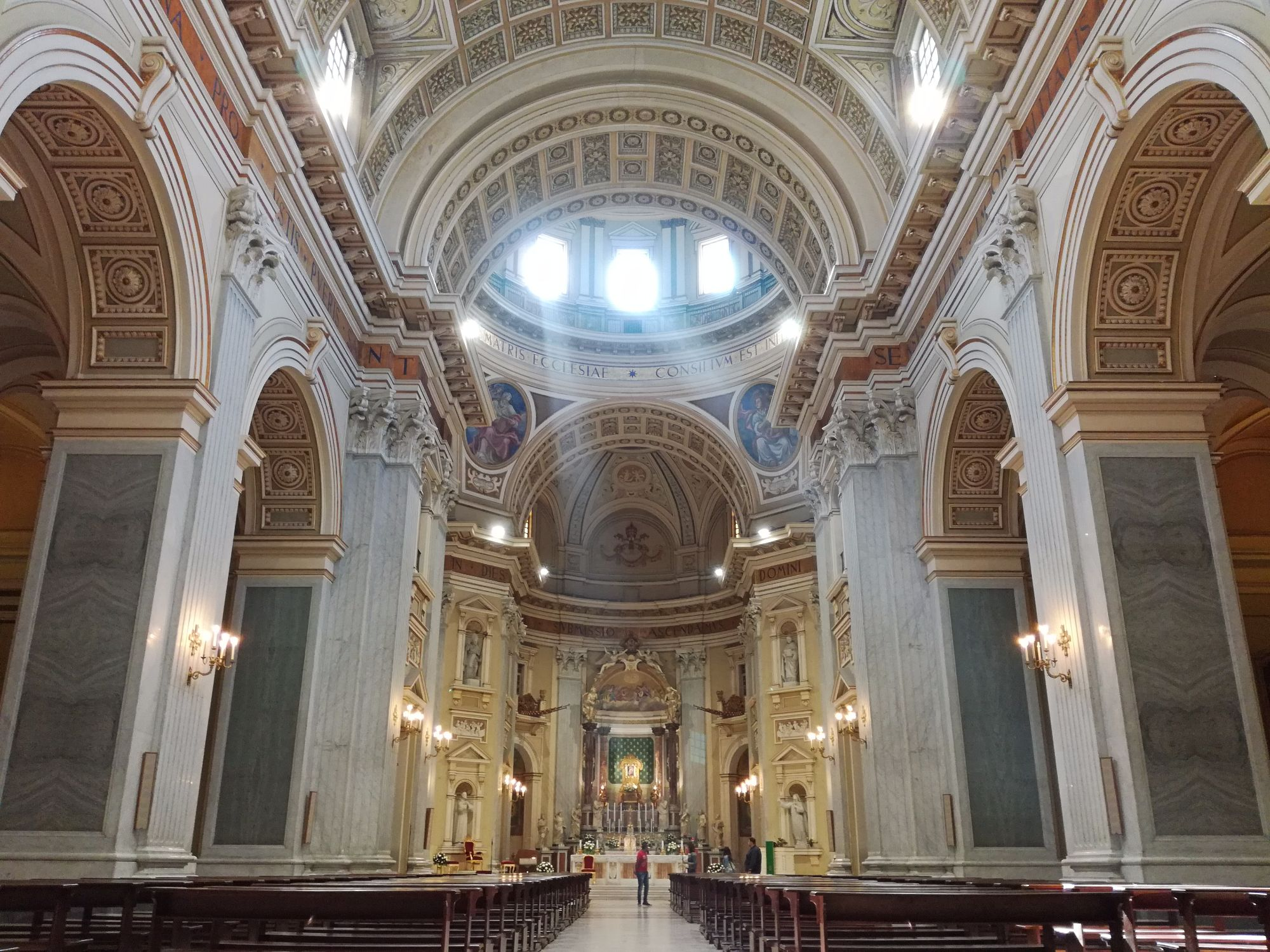 La navata centrale della Basilica dell'Incoronata Madre del Buon Consiglio (Napoli)